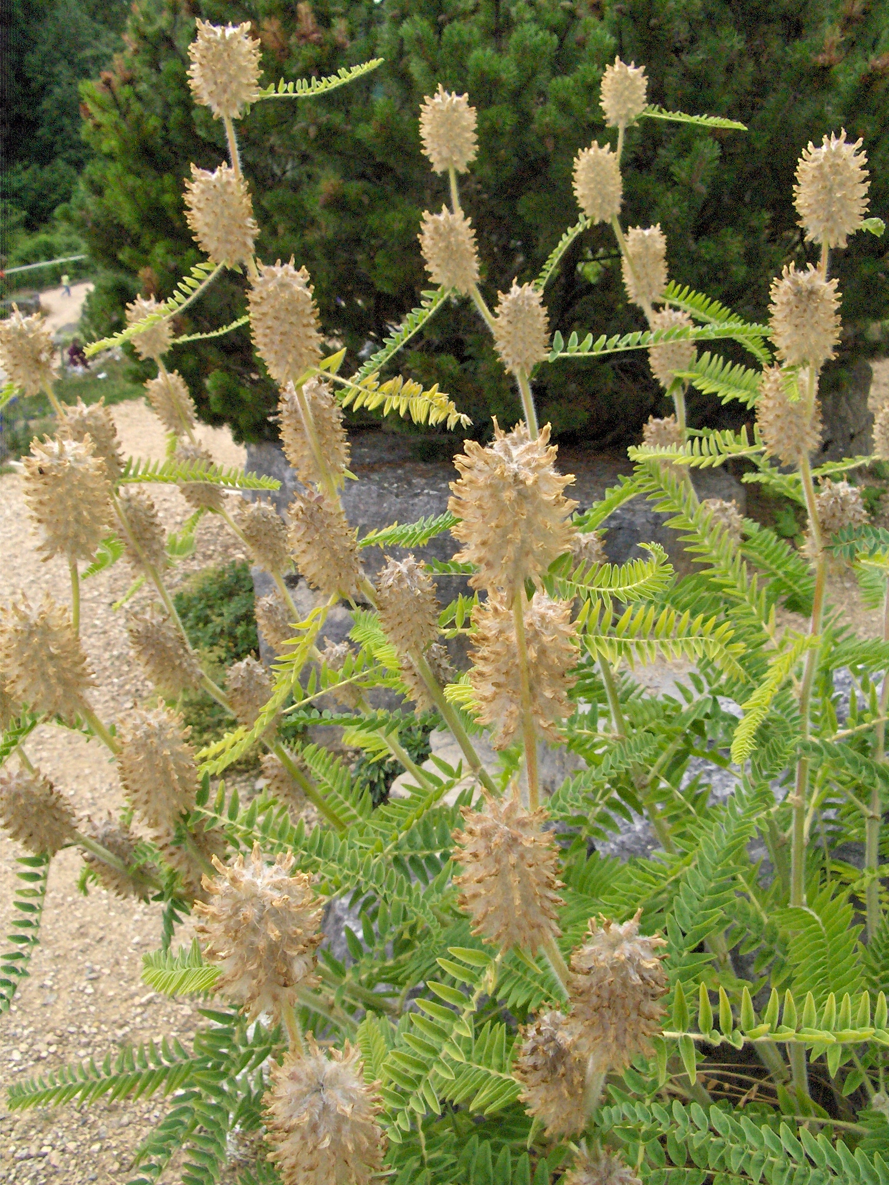 Astragalus centralpinus